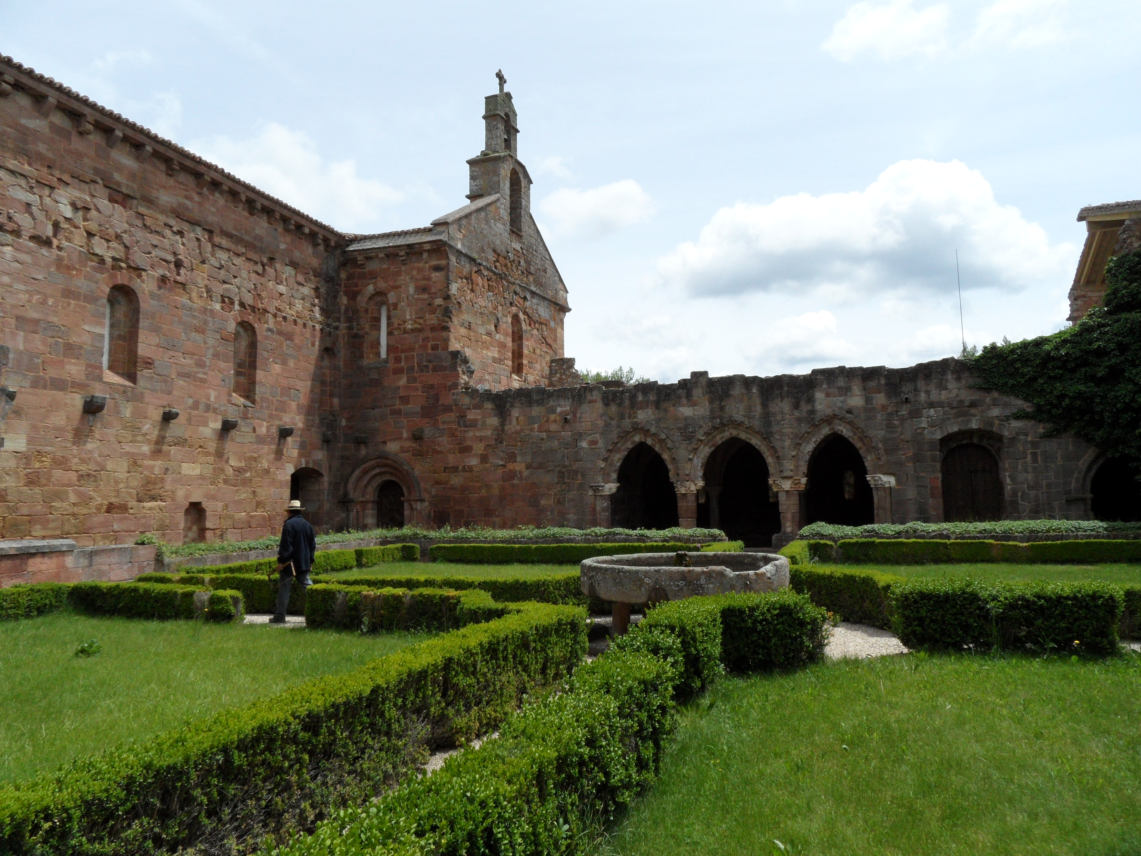 Monasterio Santa Maria de Bujedo de Juarros. Este Monasterio es de propiedad privada, y ha sido restaurado siendo galardonado por la Asociación Europa Nostra en el año 1981